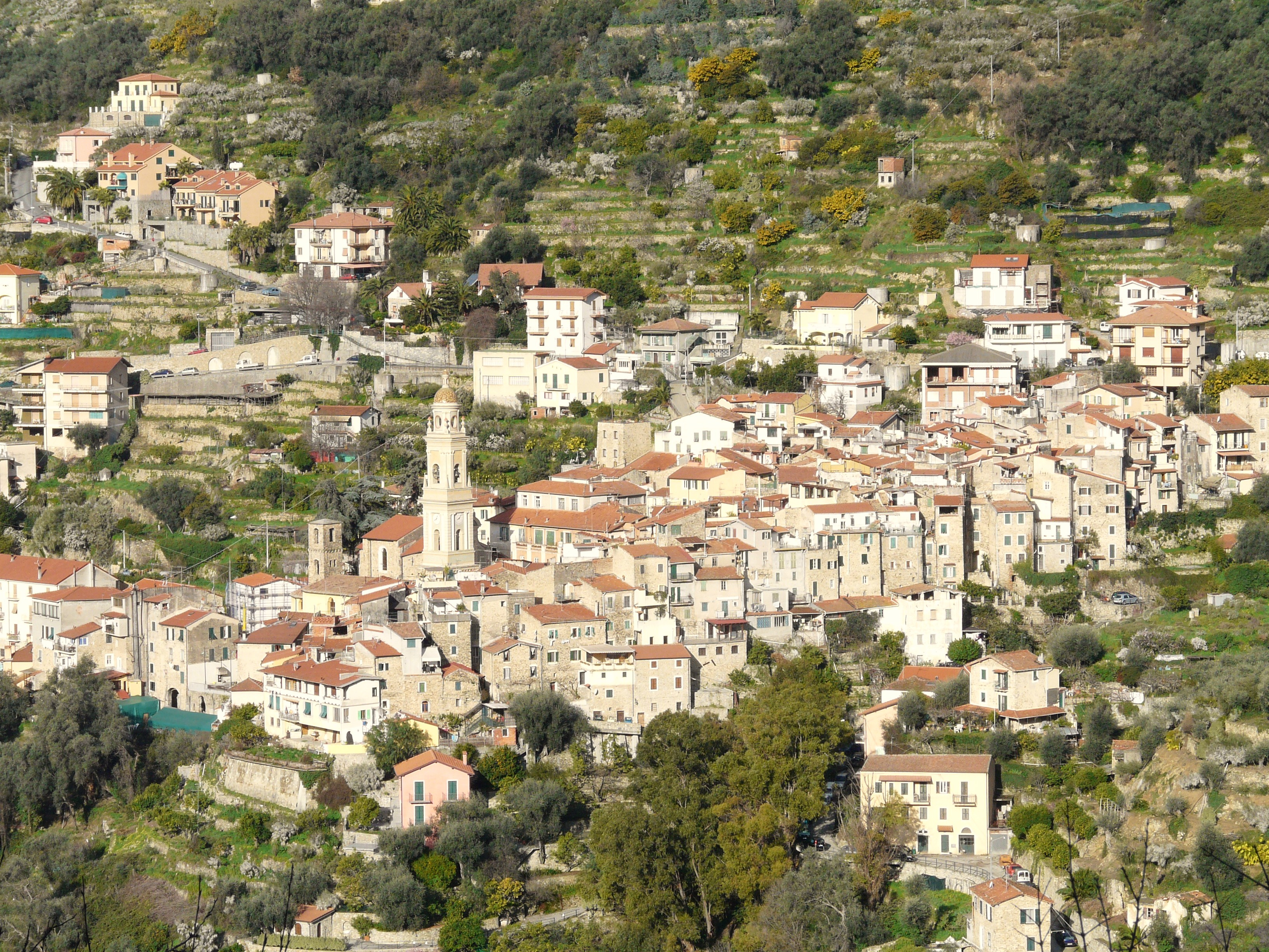 Vallebona, Liguria, Italia